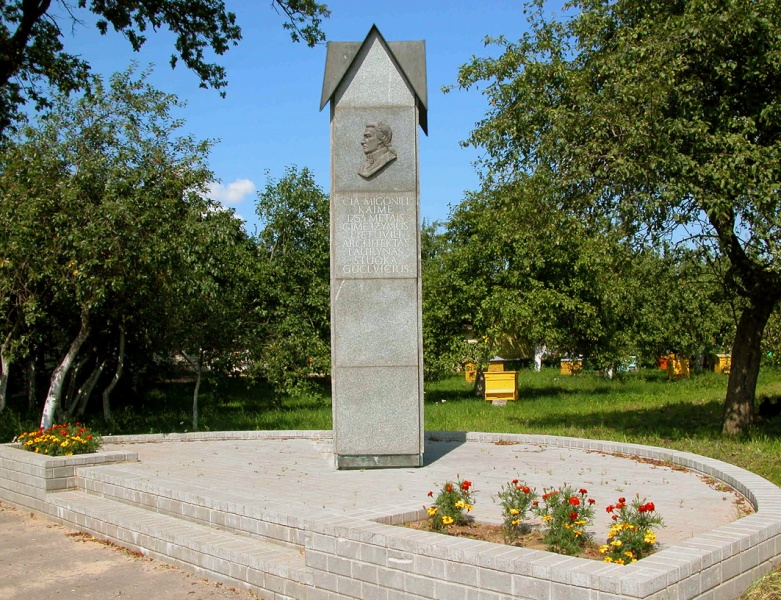 Lauryno Stuokos-Gucevičiaus gimtinėje Migonių kaime (Kupiškio r.)